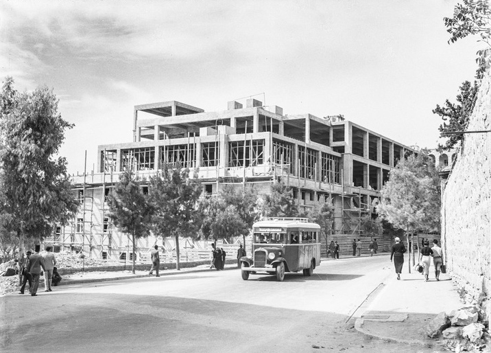 בניין הדואר המרכזי בירושלים בעת בנייתו